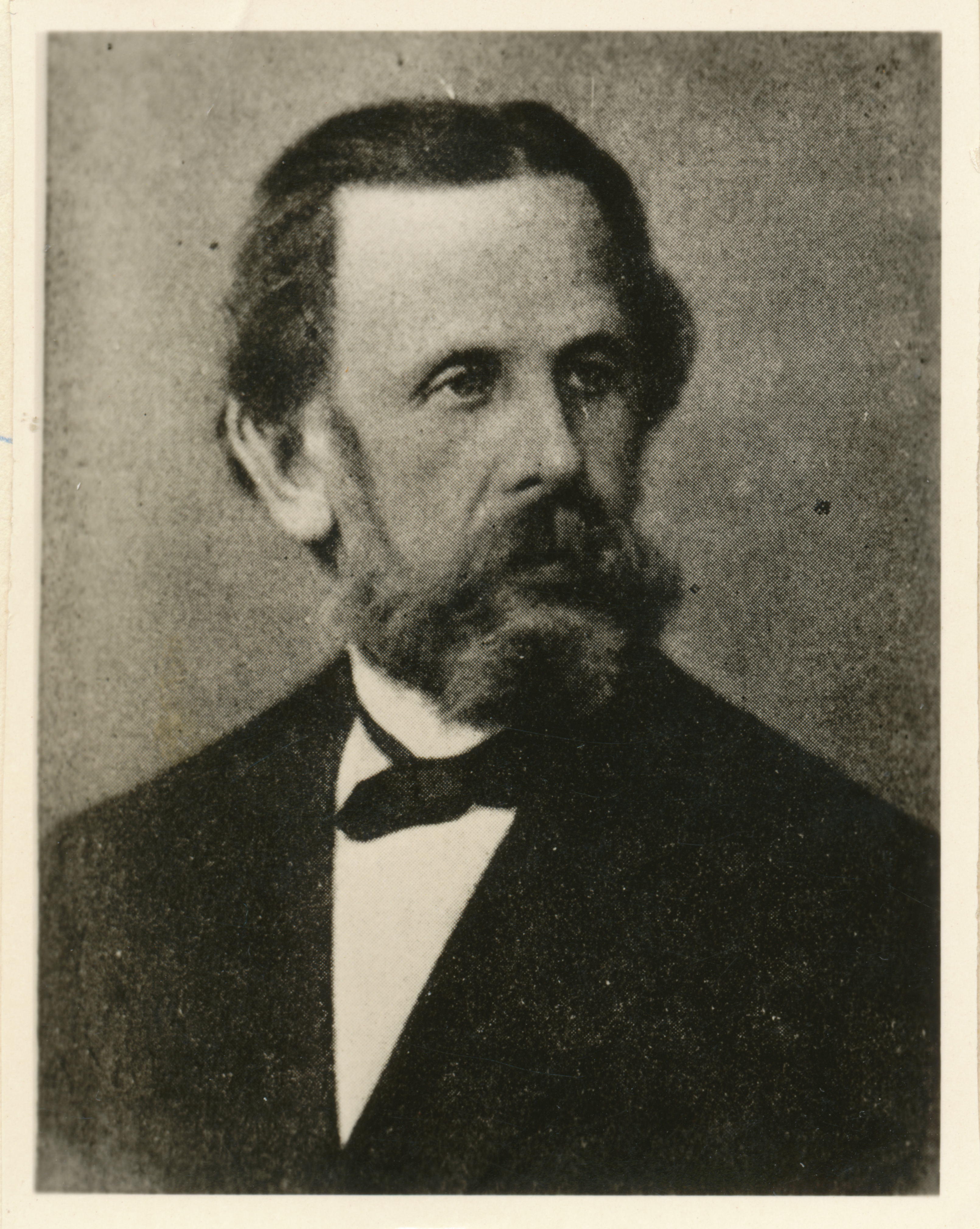 Porträtfotografie des preußischen Landrats und Regierungspräsidenten Wilhelm von Wienskowski genannt von Saltzwedel (1820-1882)